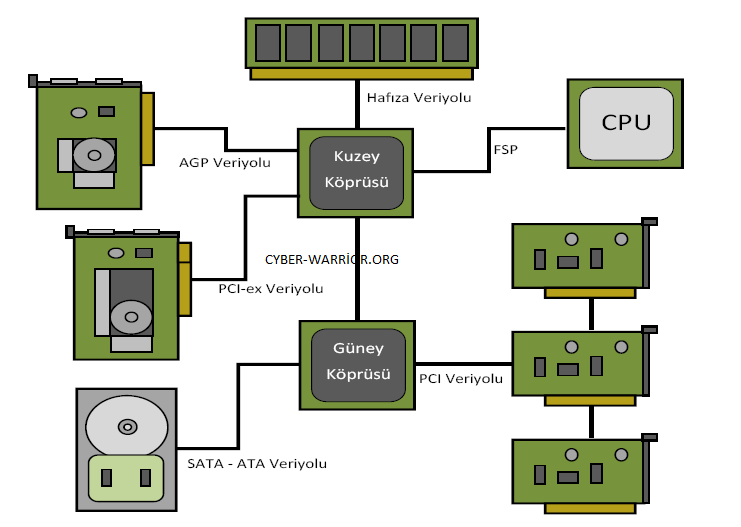 görsel